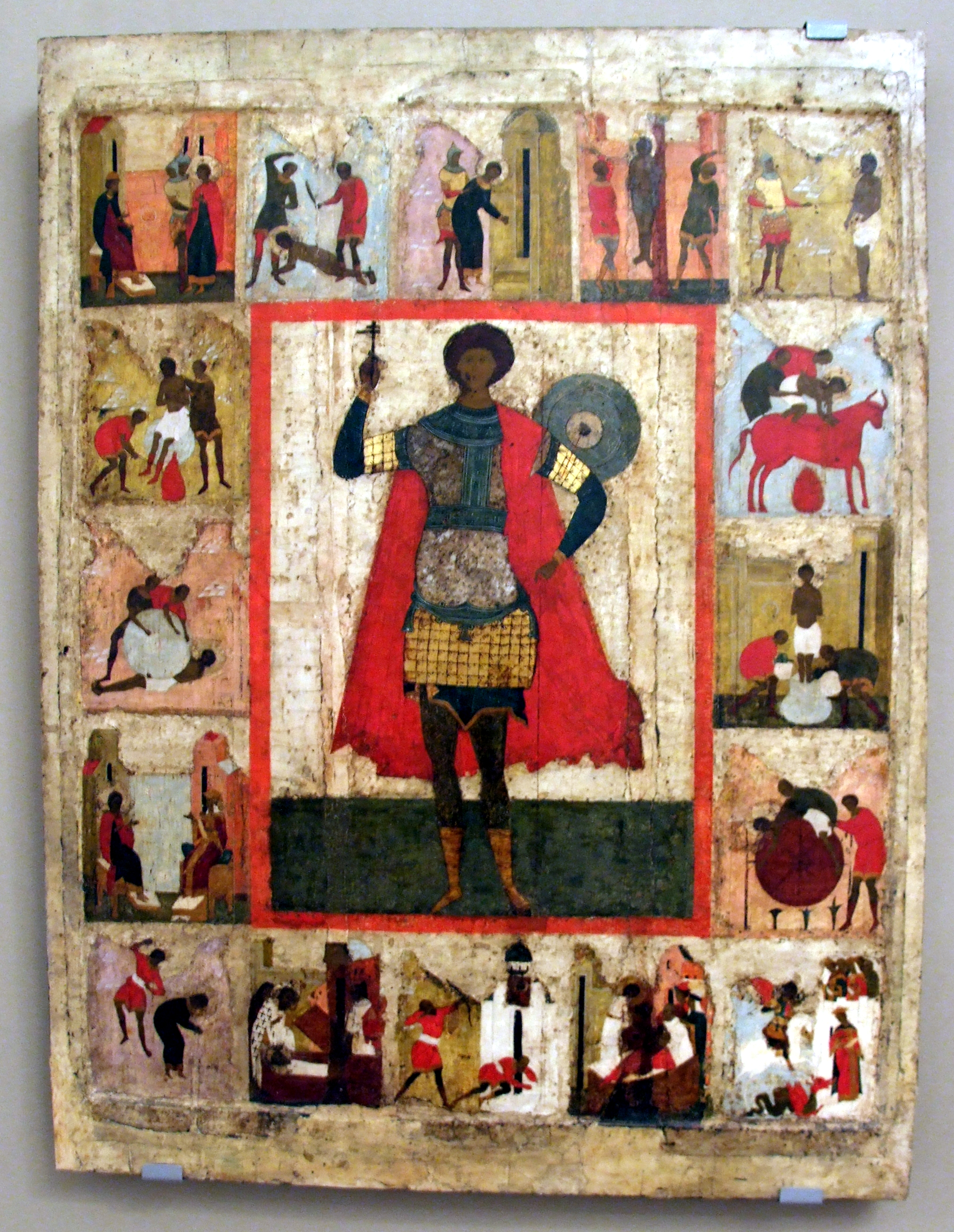 Великомученик Георгий Победоносец с житием. 16 век, Москва